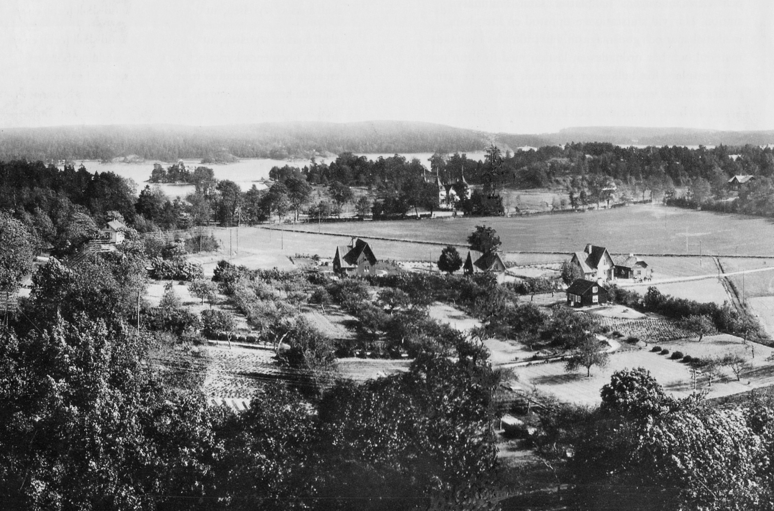 De första villorna längs dagens Germaniavägen, huset i mitten är Germaniavägen 21. Utsikt från Djursholms vattentorn mot sydost.